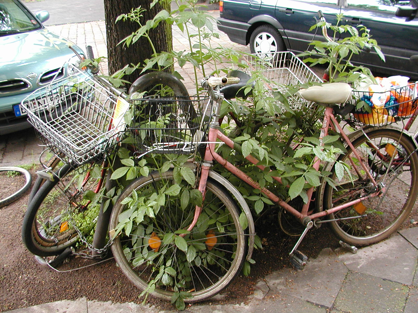 Düsseldorf, Räder im Grünen